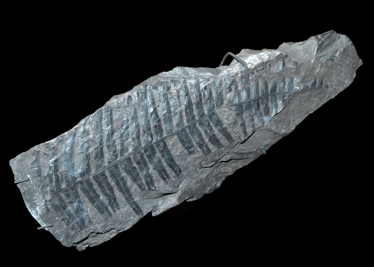 Naturhistorisches Museum Wien